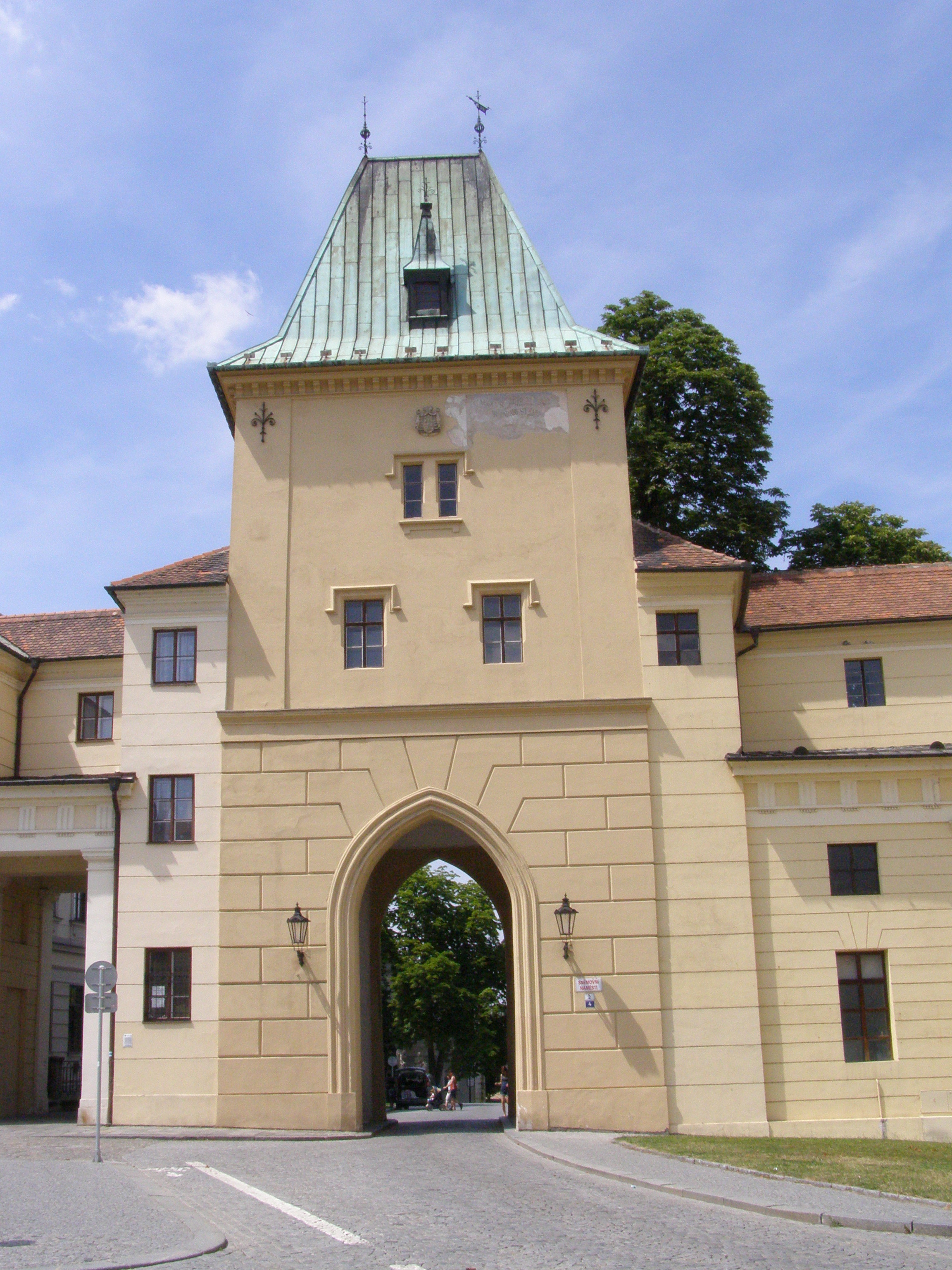 Kroměříž, Mlýnská brána